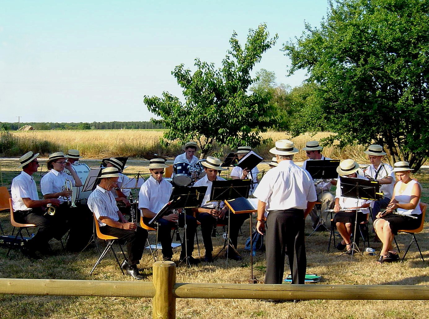 Musique municipale de Limeray - Fête de la musique 2005 au Buisson - Limeray - Indre-et-Loire - France